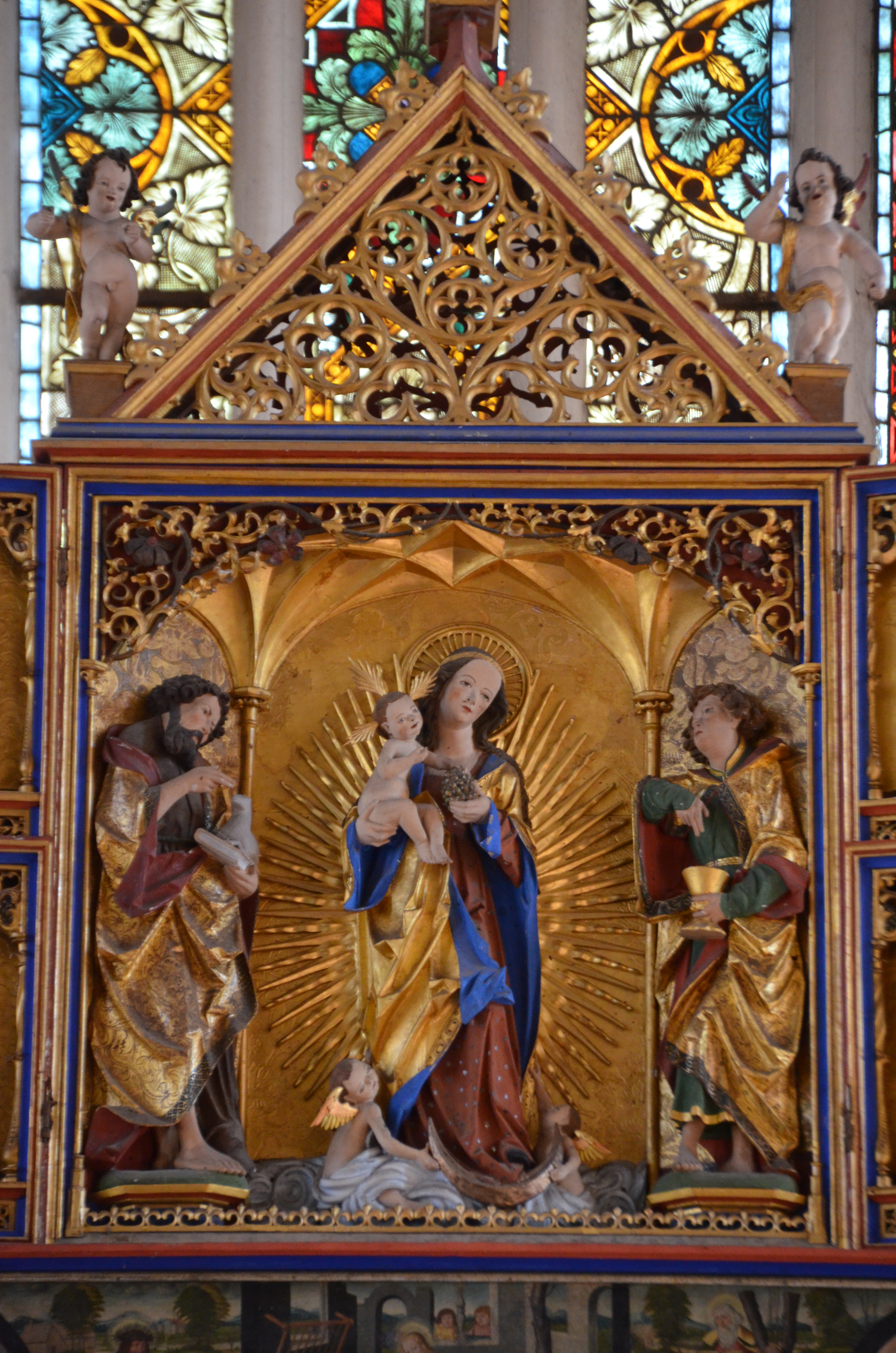 Altar der Marienkirche in Wittstock/Dosse (Detail)